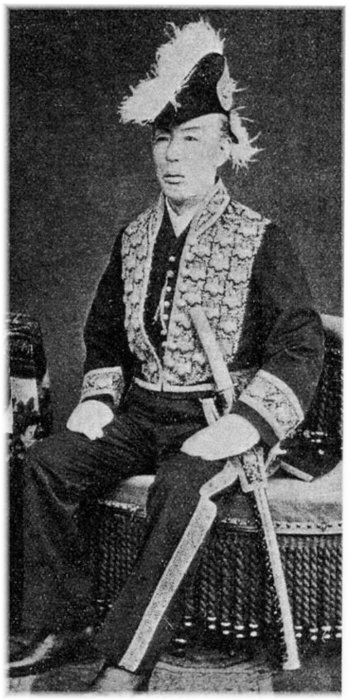 佐竹義堯（1825-1884） 第12代久保田藩主